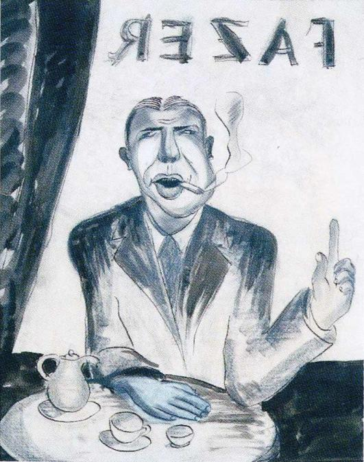 Taiteilija Väinö Kunnaksen tekemä karikatyyri kirjailija Mika Waltarista, julkaistu Tulenkantajat-lehden näytenumerossa vuonna 1929. Alkuperäispiirroksen omistaa Suomalaisen Kirjallisuuden Seura.